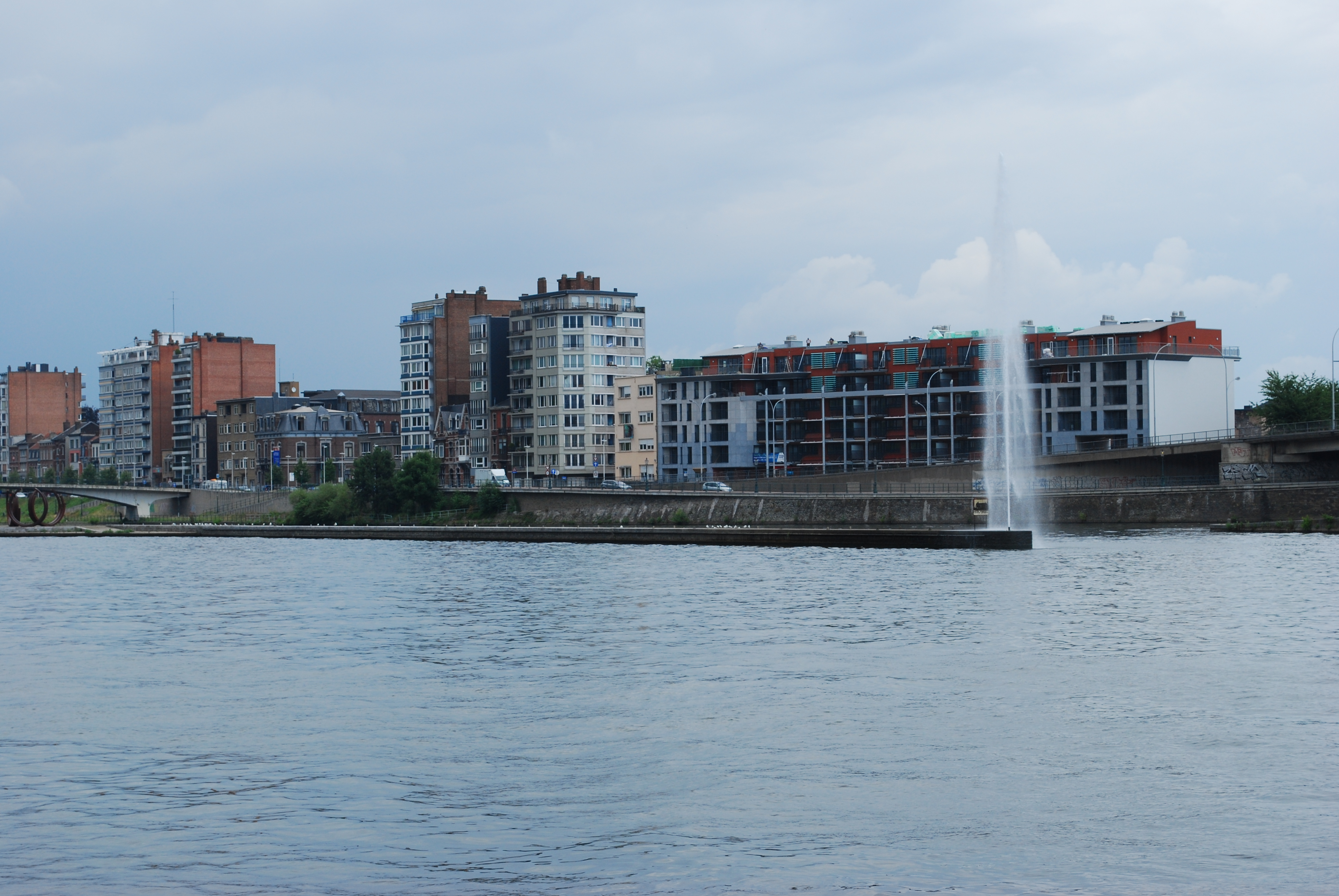 Le quai Mativa sur la Meuse à Liège, vu depuis la rive gauche.